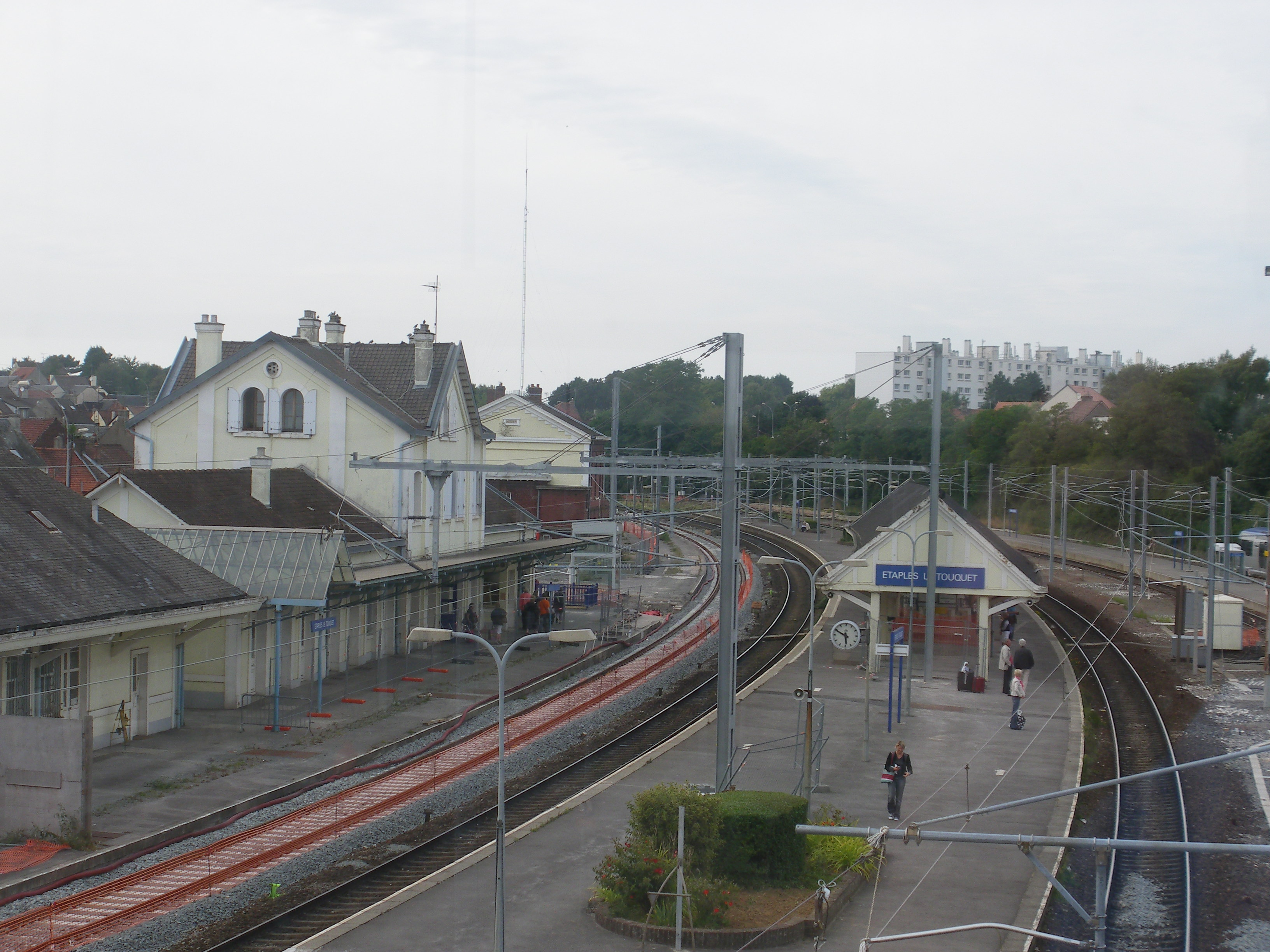 Gare d'Etaples - Le Touquet